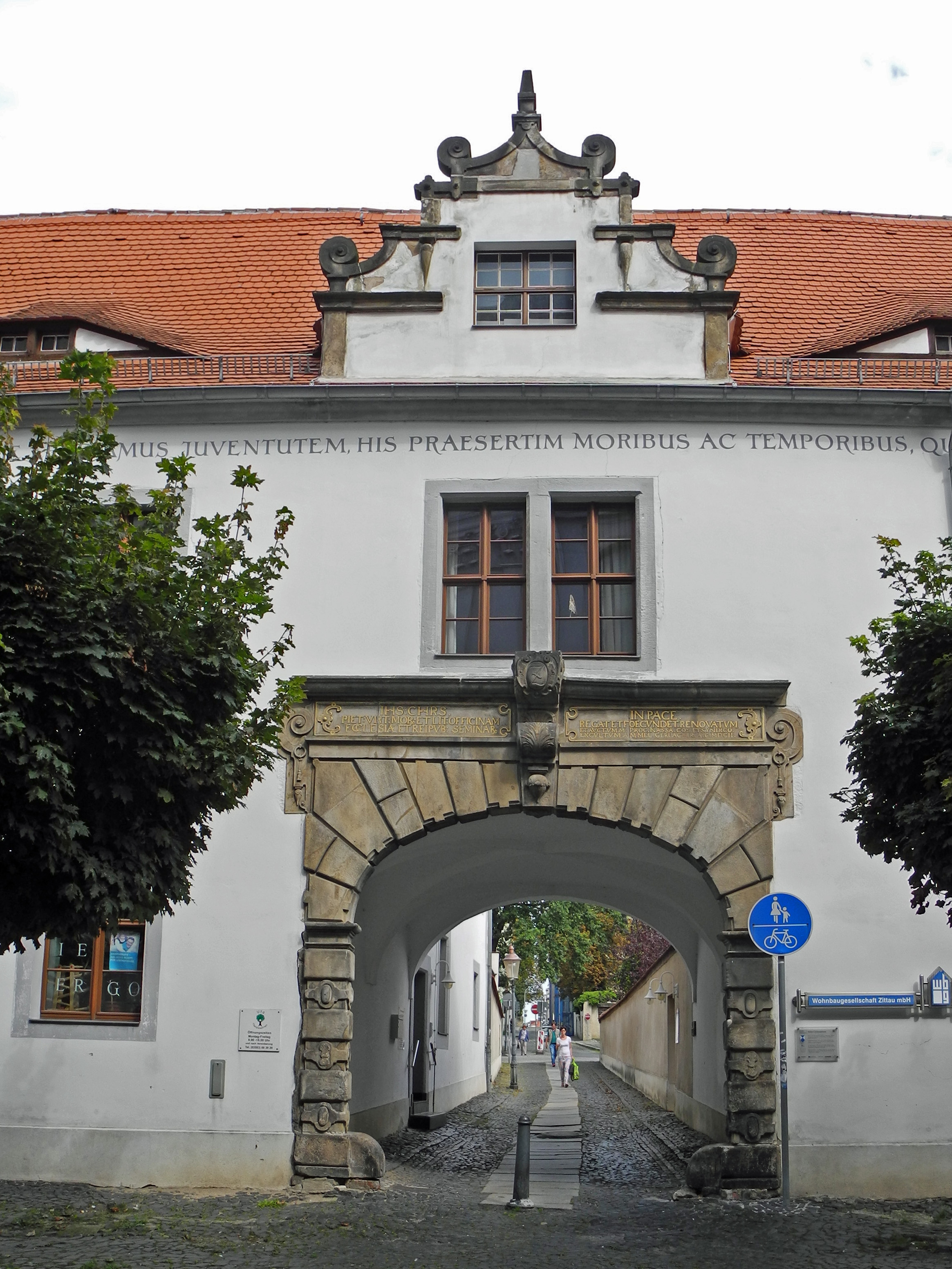 Portal am Alten Gymnasium in Zittau am Johannisplatz (Durchgang Rektorgasse)